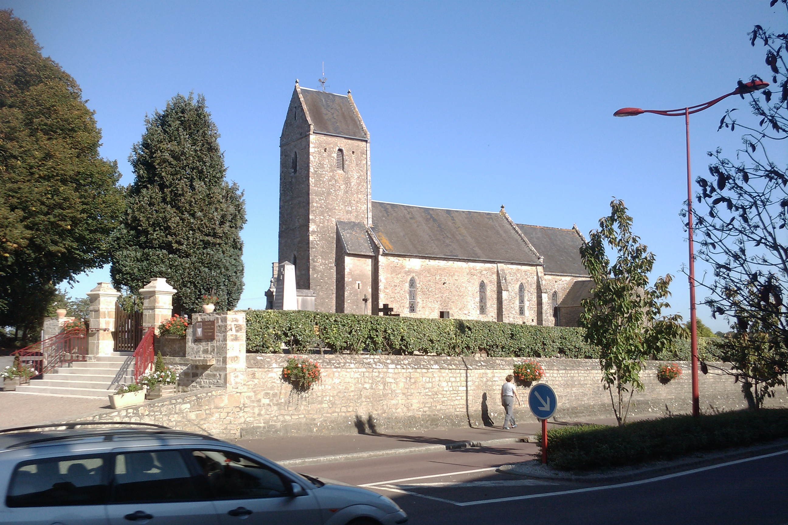 Baupte